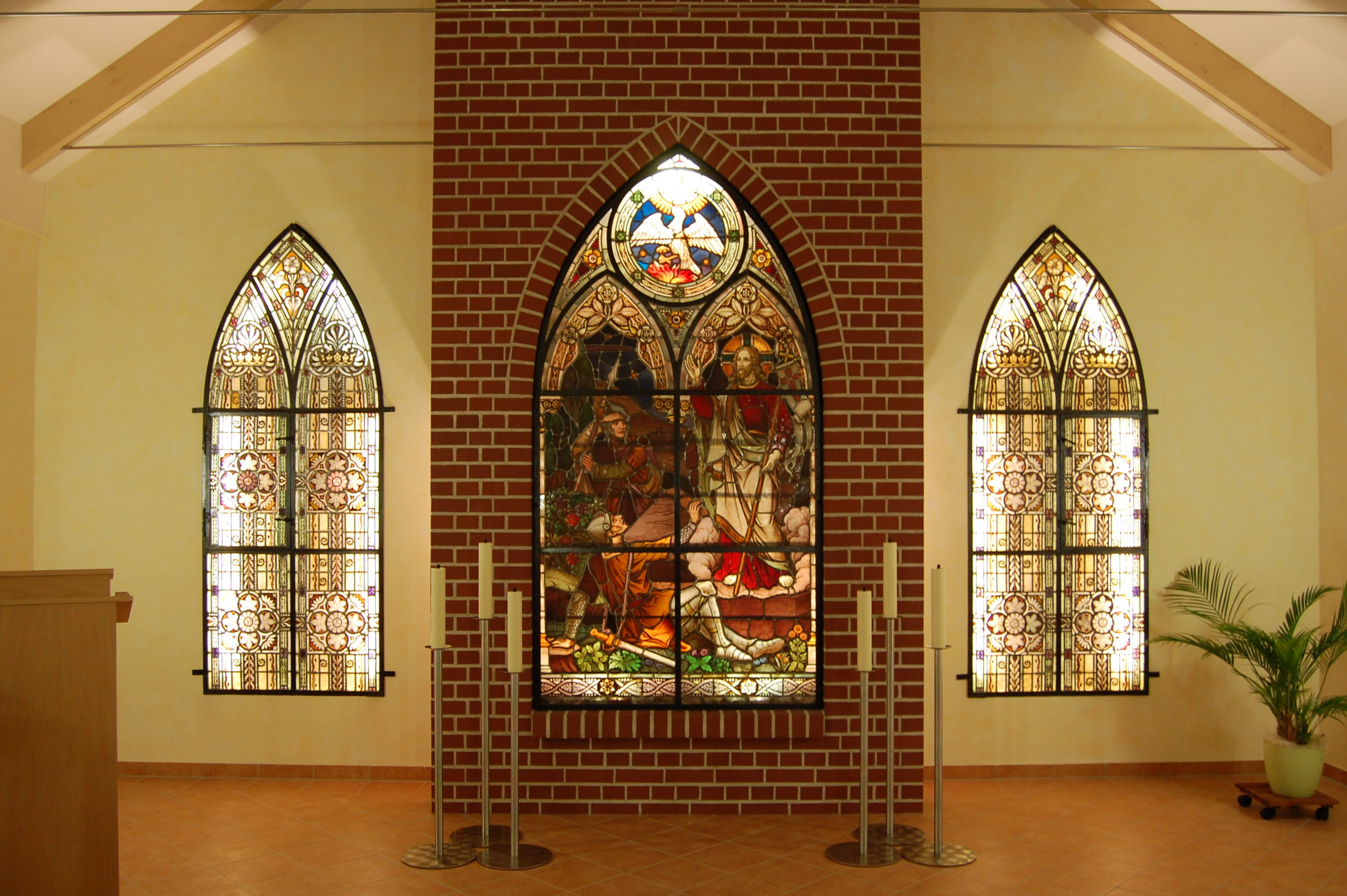 restaurierte Fenster in der Friedhofskapelle Salbke am Tag der Neueröffnung